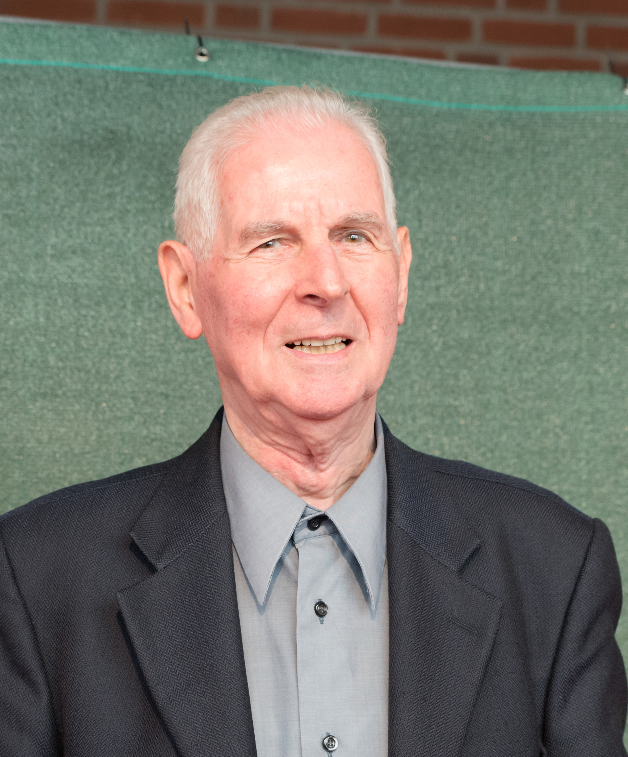 Walter Eschweiler beim Tag der Legenden 2016 in Hamburg